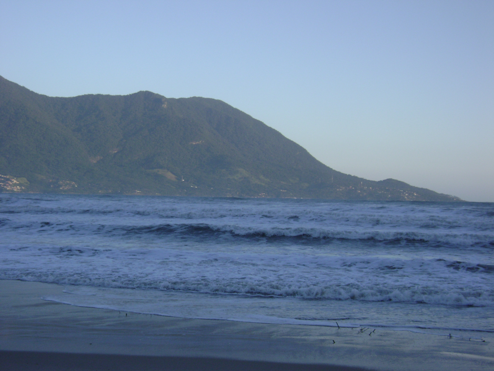 Extremo sul da Ilhabela visto da praia de Guaecá, em São Sebastião.